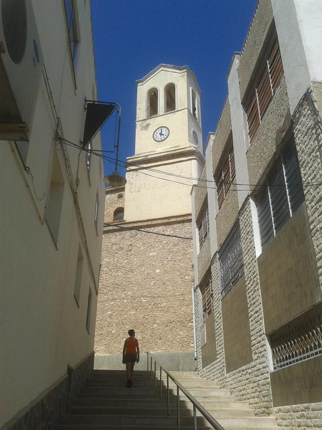 Kerk - Maagd van Candlemas